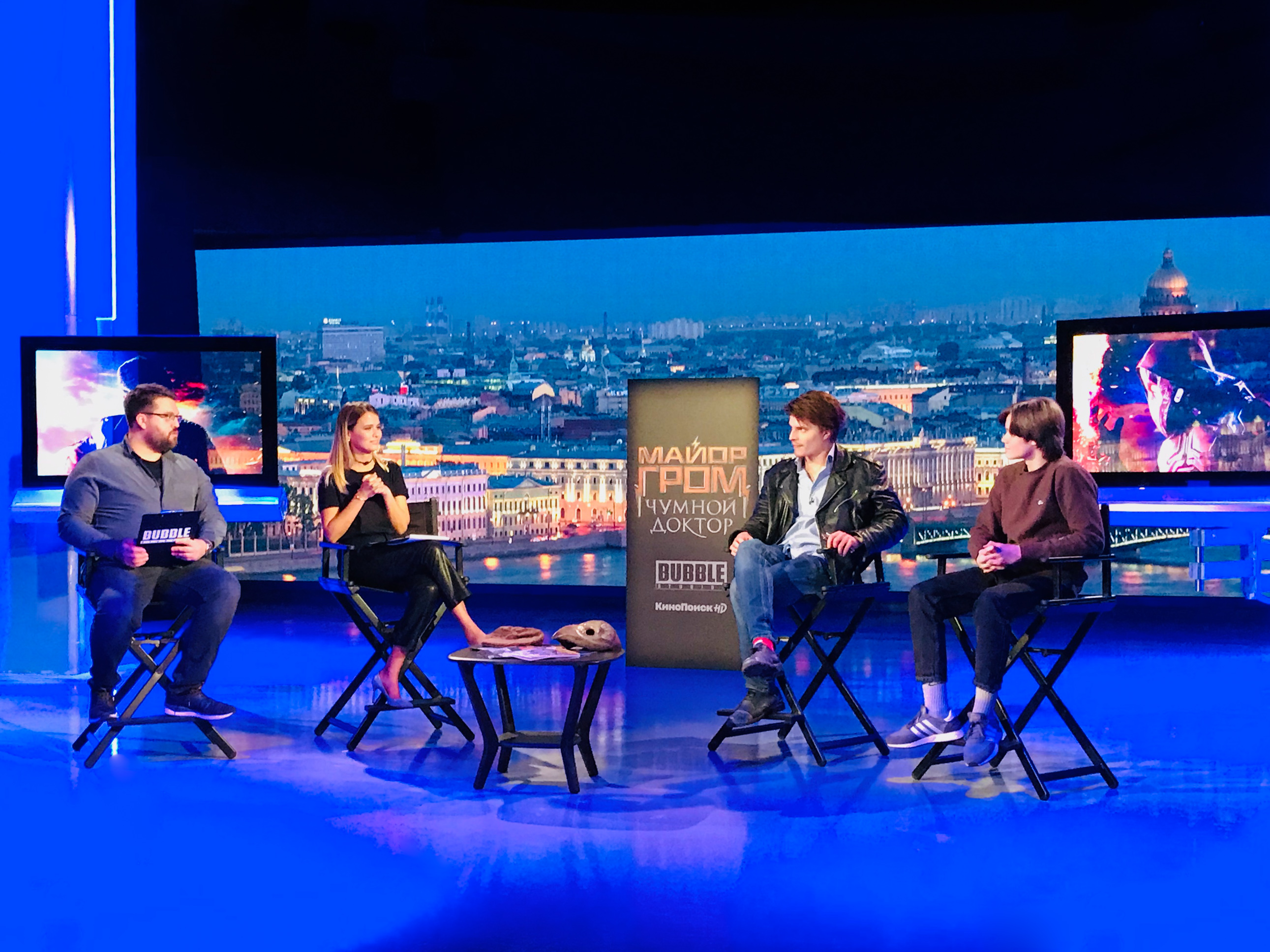 Роман Котков, Любовь Аксёнова, Сергей Горошко и Олег Чугунов на презентации трейлер фильма «Майор Гром. Чумной Доктор»